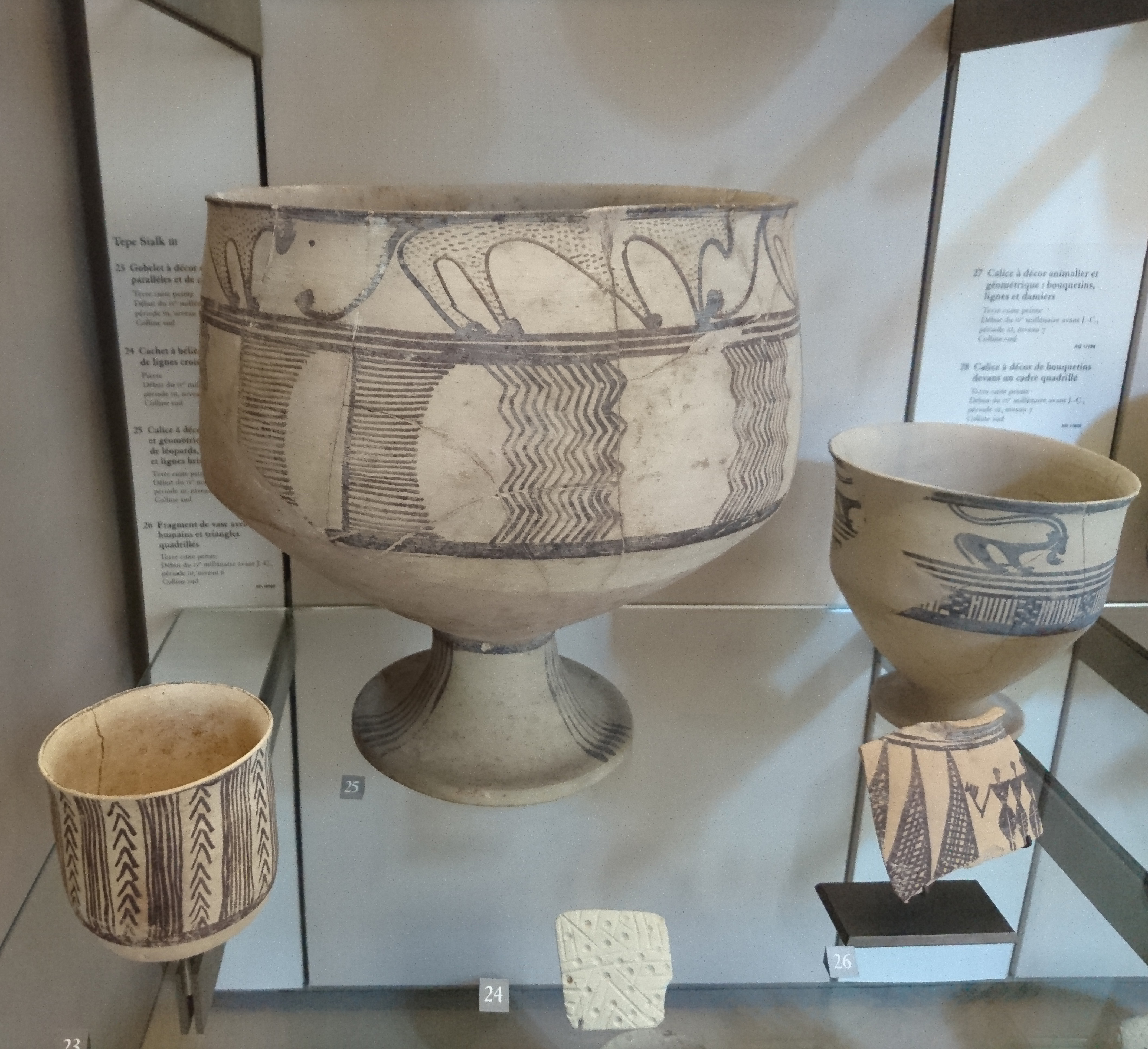 céramiques de Tepe Sialk, musée du Louvre